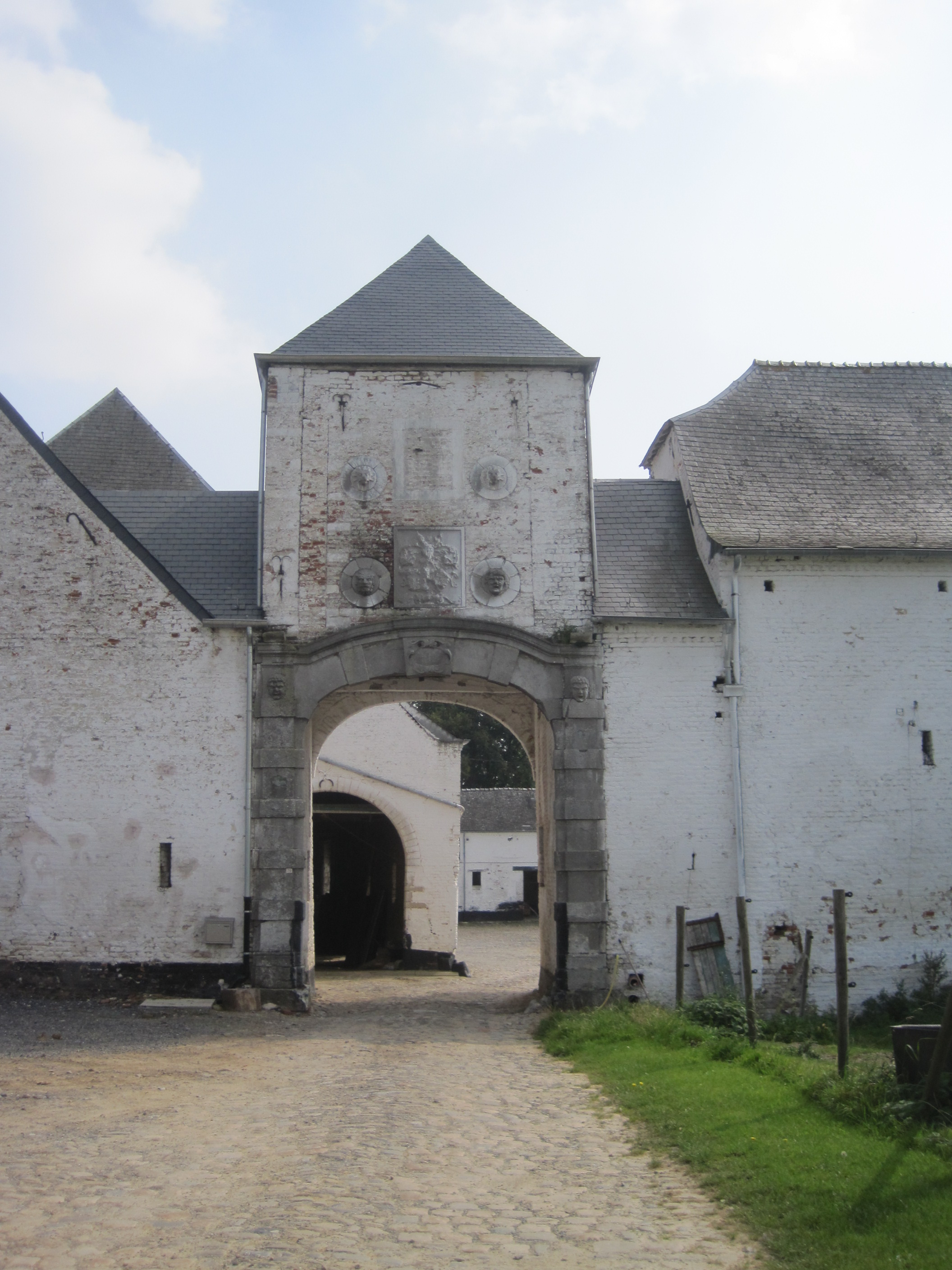 Les façades et toitures de la ferme ainsi que le pavement de la cour de la ferme Monceau à Mehaigne (M) ainsi que l'ensemble formé par cet édifice et les terrains environnants (S)